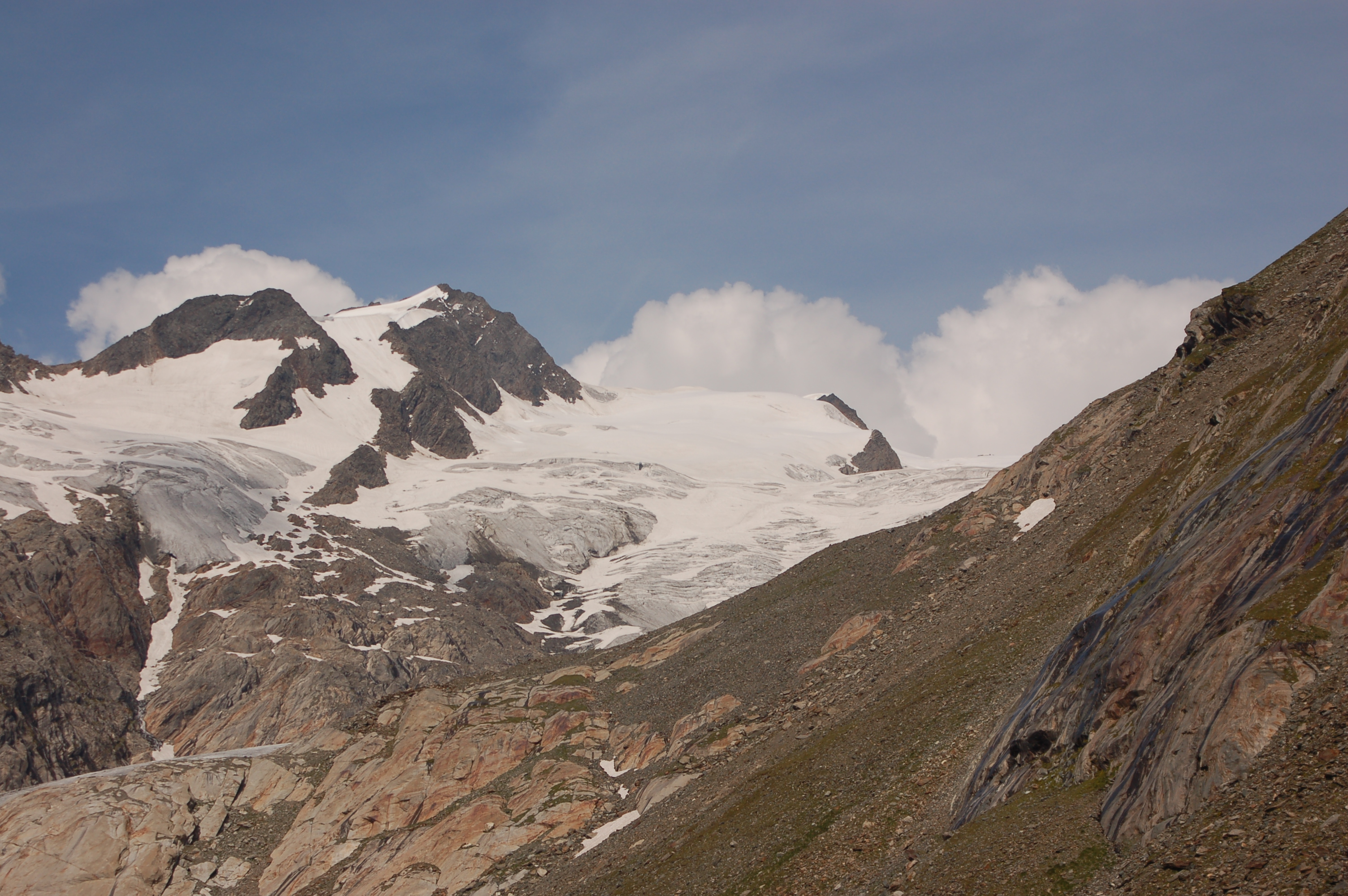 Blick vom Hinteren Umbaltal auf Dreiherrnspitze und Umbalköpfl. This file shows the National Park Hohe Tauern in Austria.